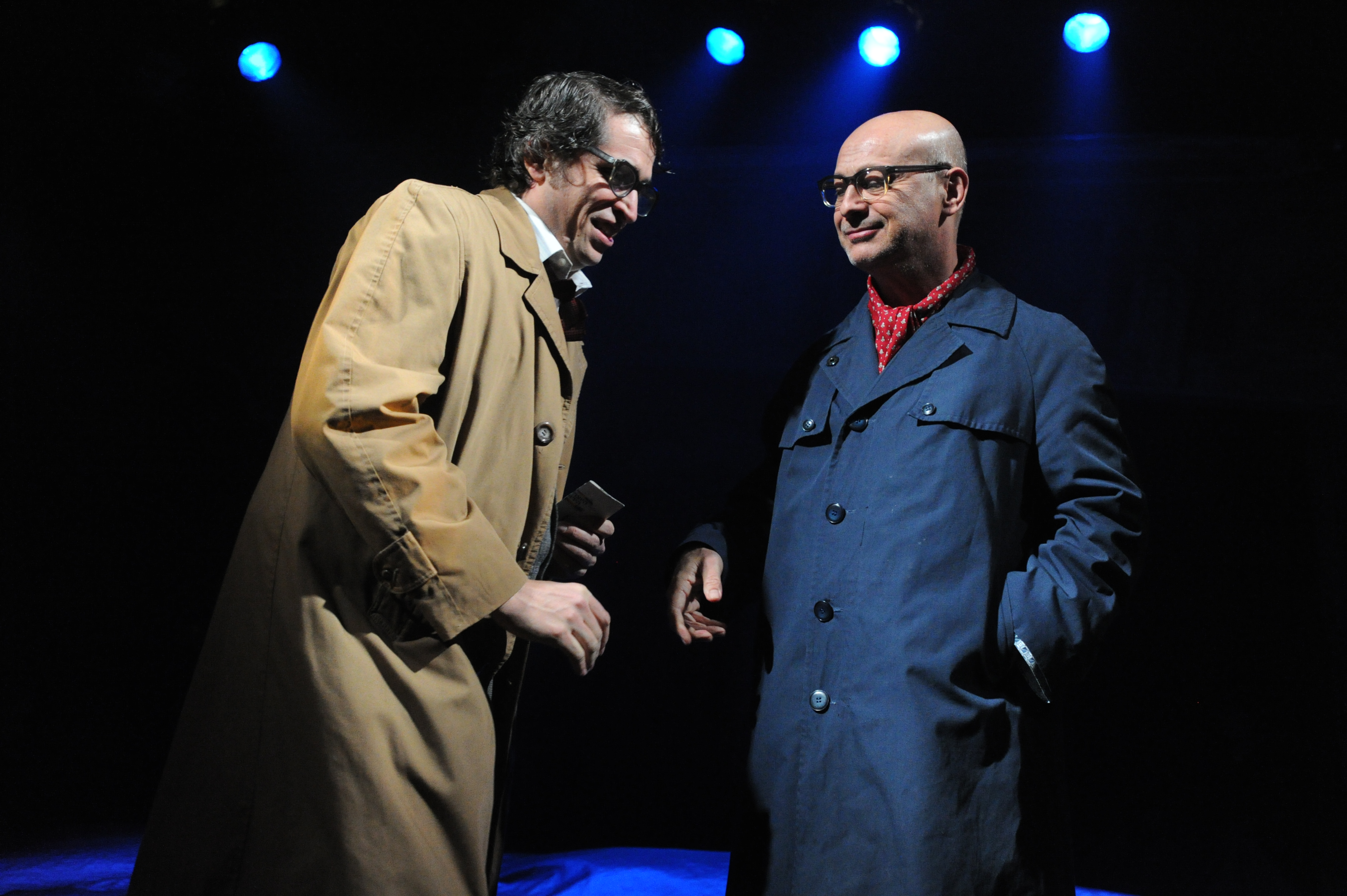 ארז שפריר ויואב היימן, בהצגה "חוקר פרטי", מאת ובבימויו של מיקי גורביץ', תיאטרון החאן, 2012